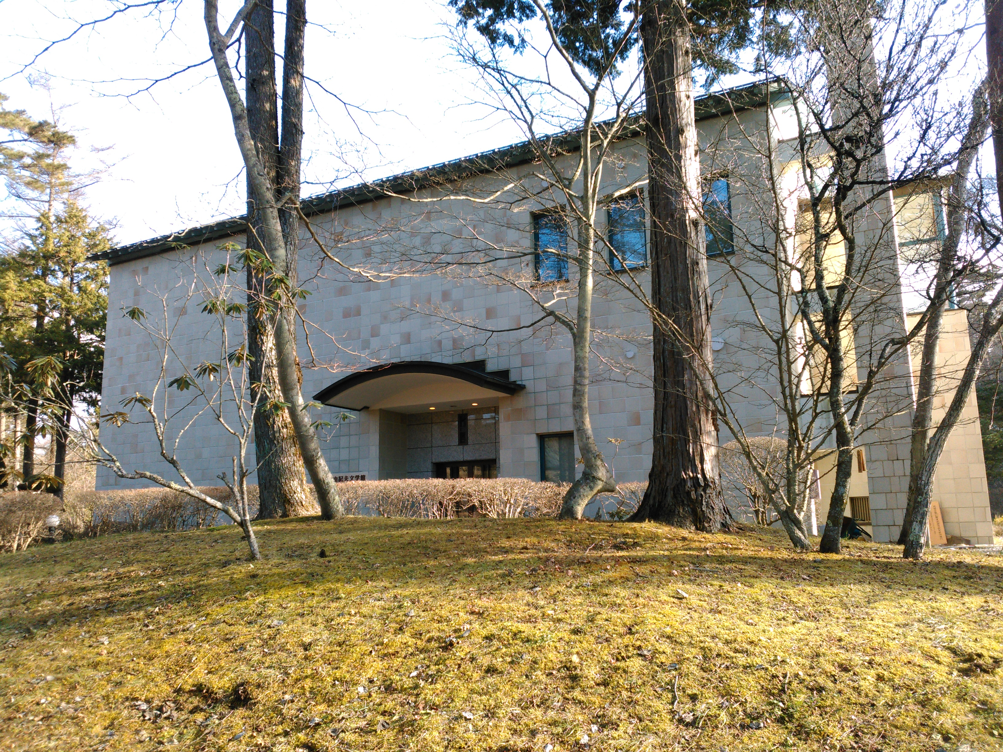 三島由紀夫文学館 - 外観